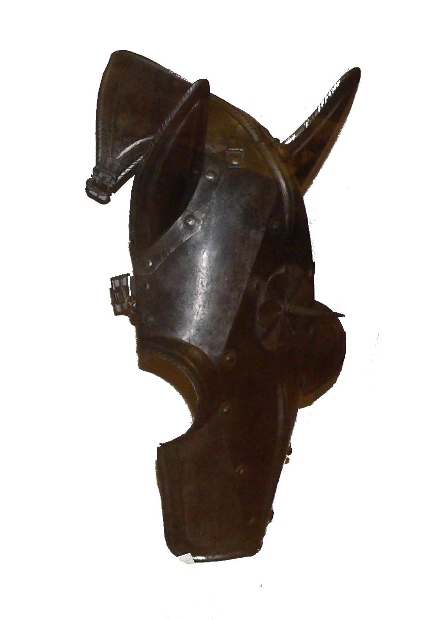 Chanfrain, Savoie, XVIe siècle. Musée du chateau de Morges, Suisse.